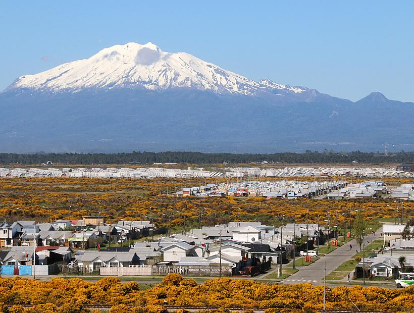 Volcan Calbuco